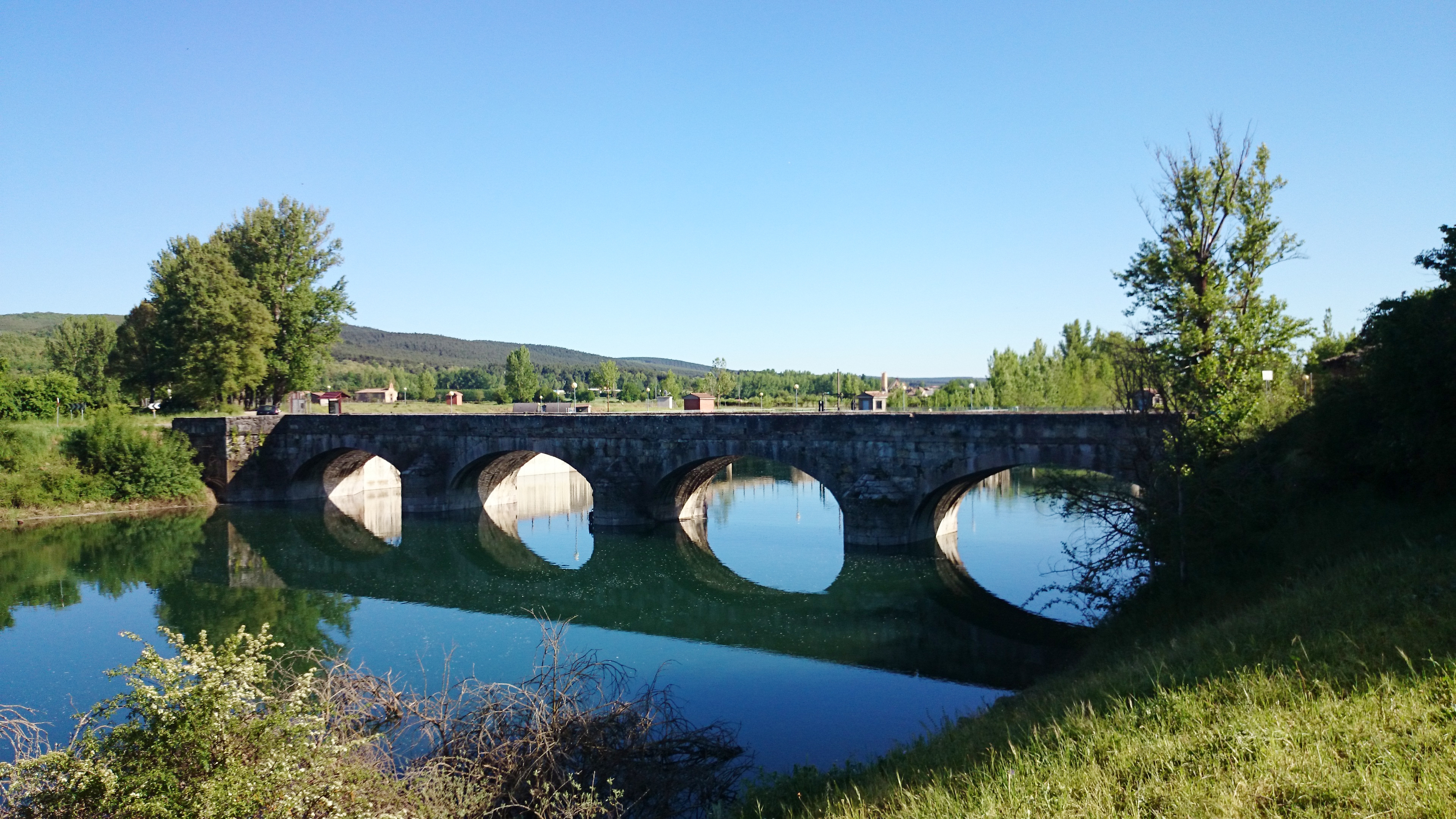 Puente de Mercadillo (Cistierna) - Río Esla.